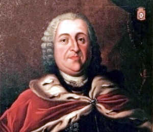 Johann_Baptist_von_Schauenburg; Grossprior des deutschen Malteserordens (1755-1775)